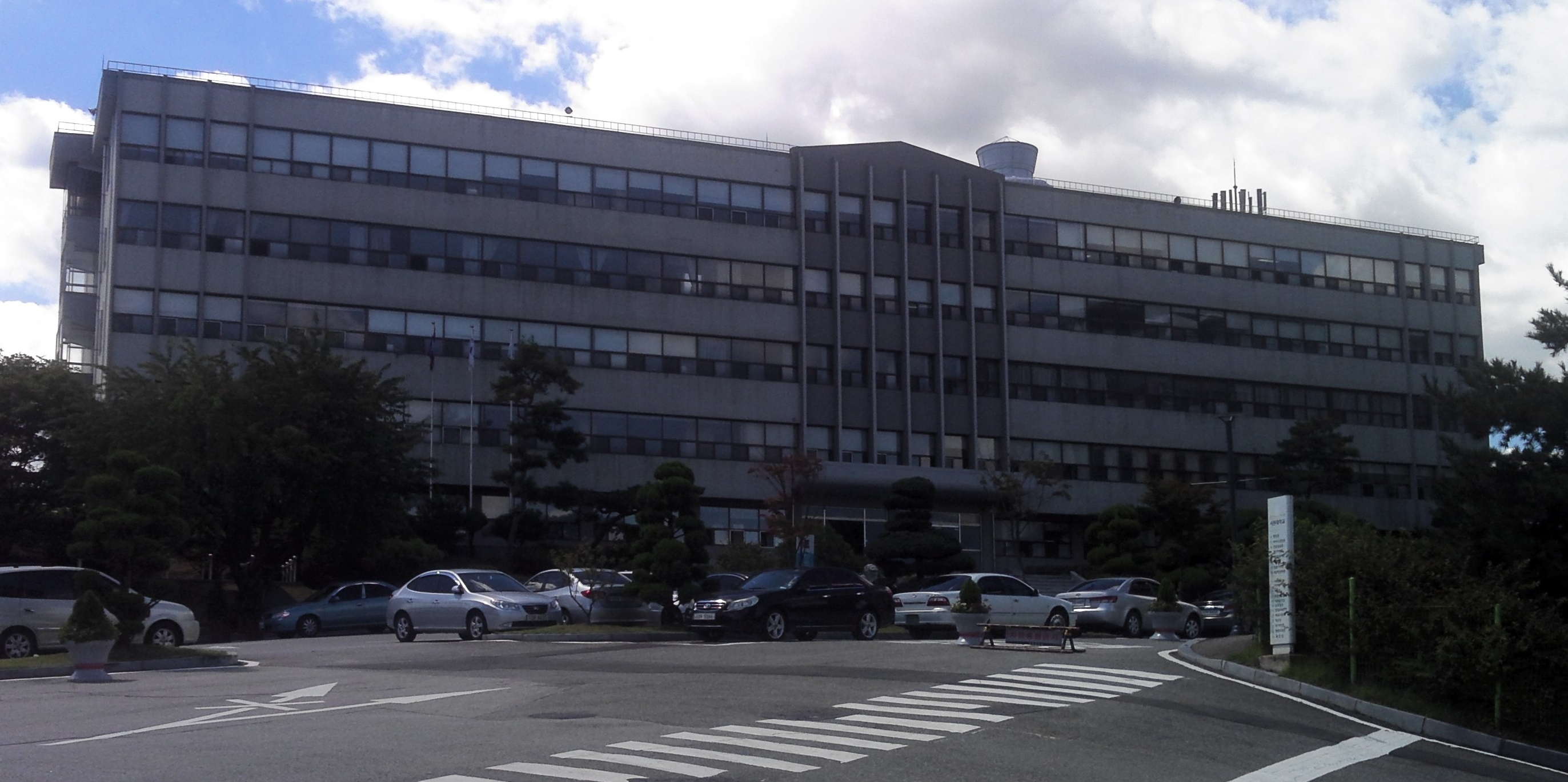 서원대학교 행정관(본부기능)